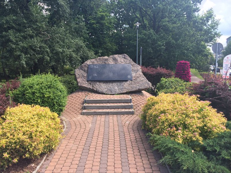 Pomnik pielgrzymki rycerza Andrzeja Ciolka w Warszawie-Kabatach